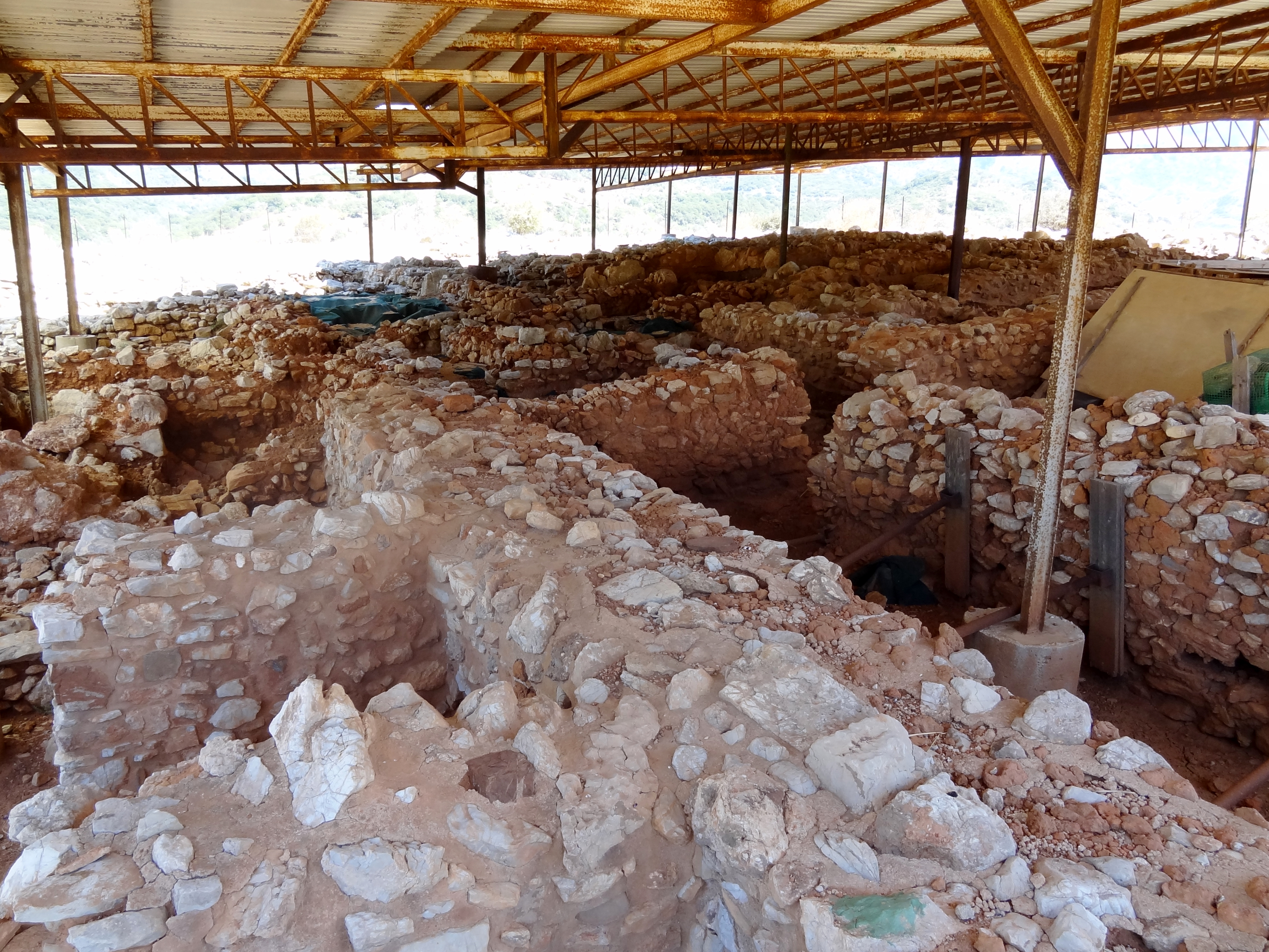 Archäologische Ausgrabungsstätte von Monstiraki (Μοναστηράκι), Gemeinde Amari, Regionalbezirk Rethymno, Kreta, Griechenland